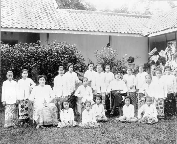 Foto. Gadis-gadis di asrama Sekolah Kartini (sekolah untuk anak perempuan) di Bogor dengan Nyonya Goes dan Nona Avelingh.